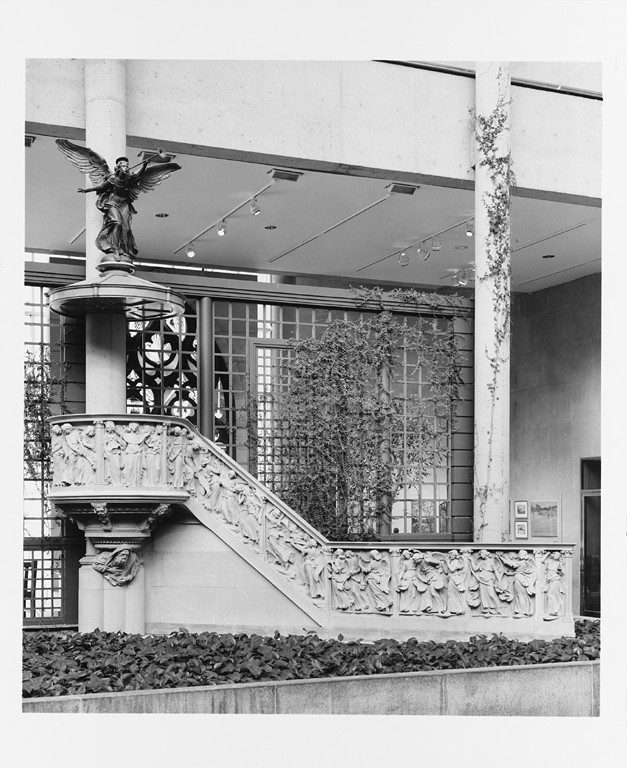 Pulpit; Architecture